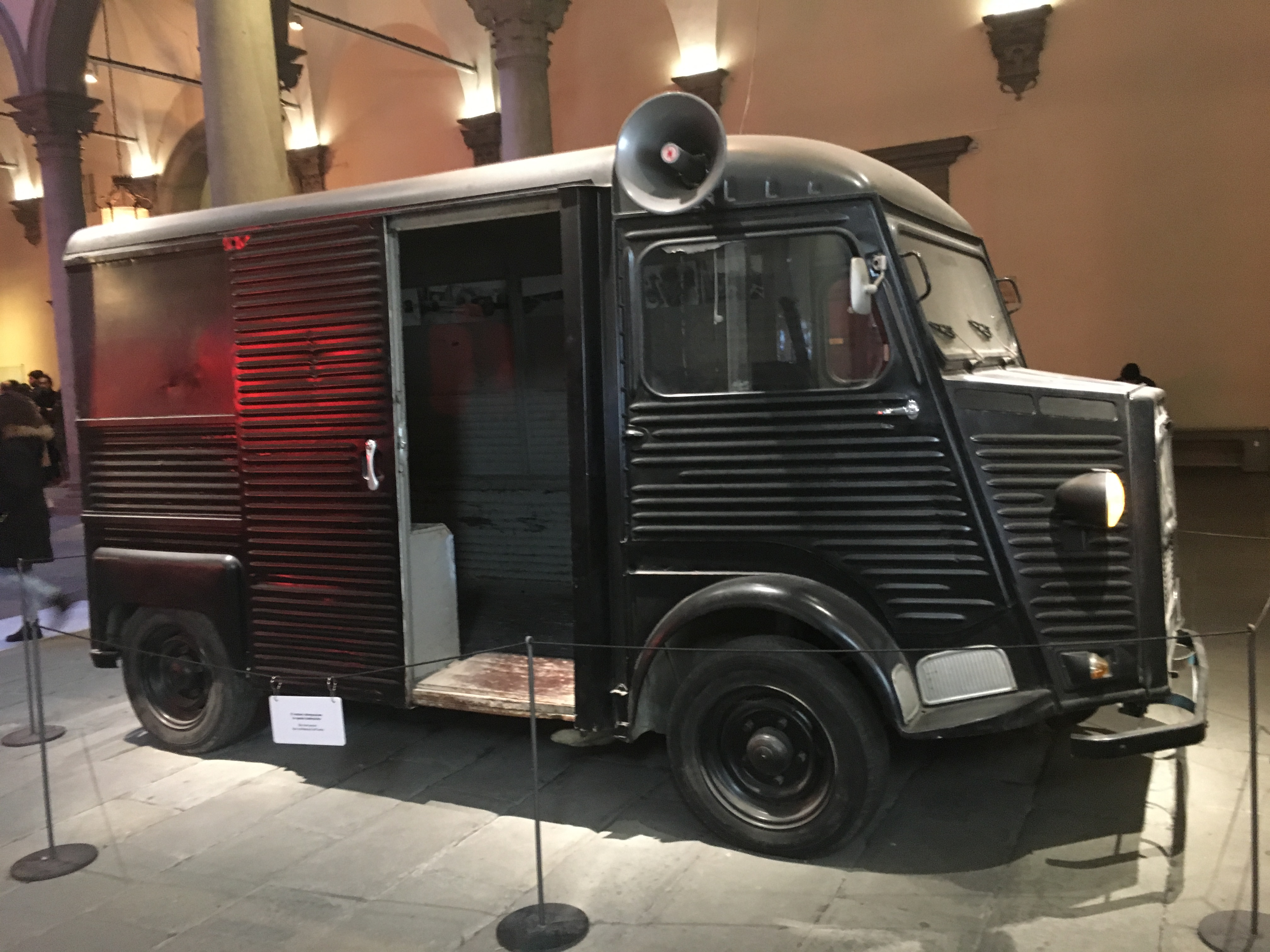 Furgone Citroen con cui Marina Abramovic e Ulay conducono vita nomade per tre anni negli anni '70 in Europa